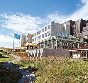 Opduin "nu"